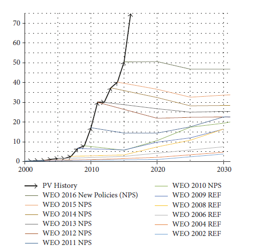 IEA-Prognosen für Photovoltaikzubau 2002-2016